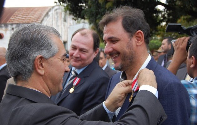 Em Campo Grande (MS) recebeu a comenda do governador do Estado Reinaldo Azambuja